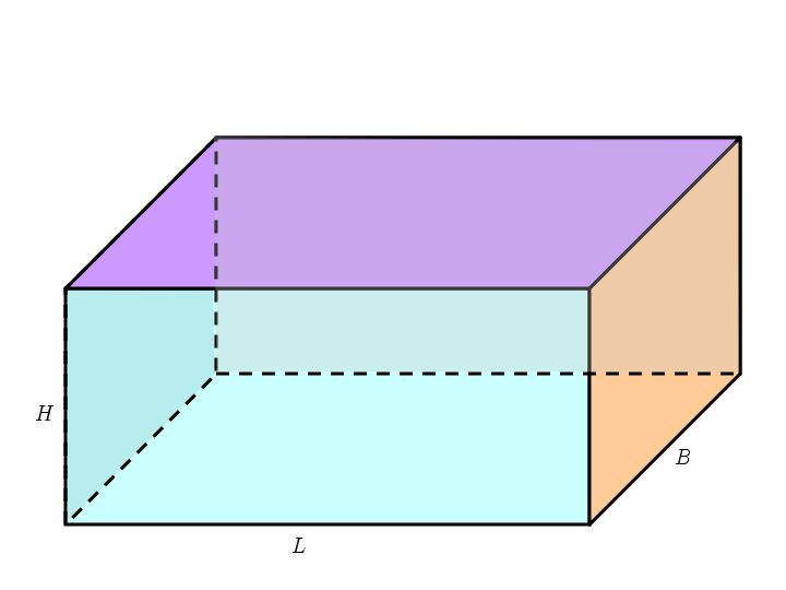 Balk - eigen werk - PD